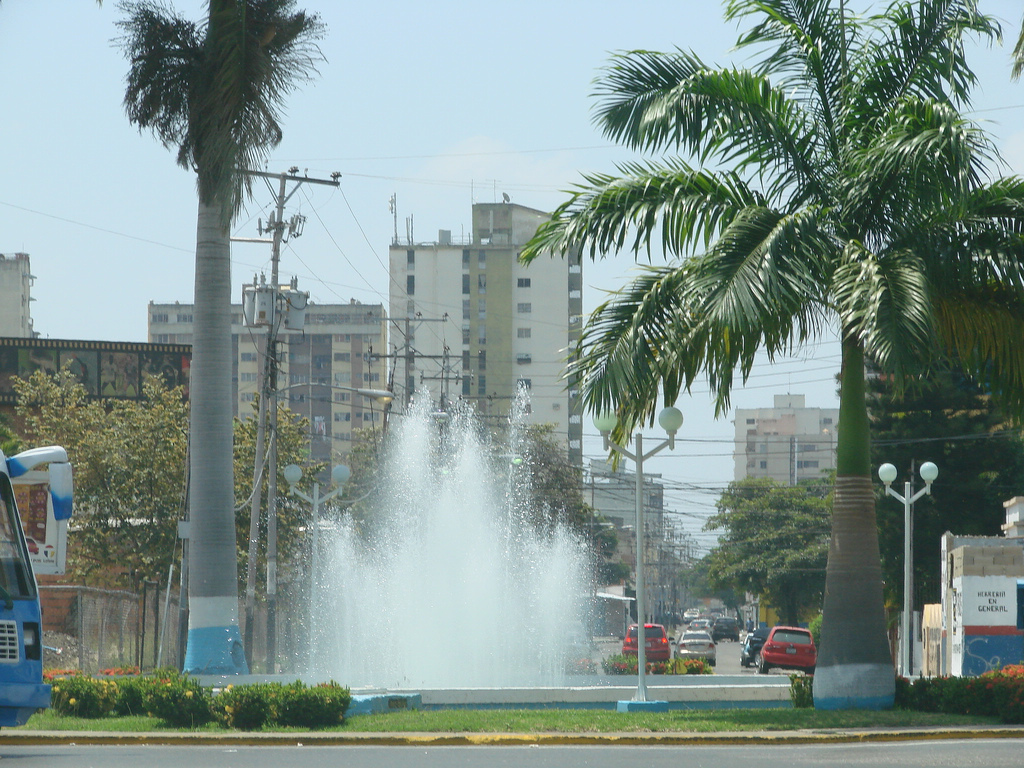 Vía Universidad. Maracay. Aragua. Venezuela